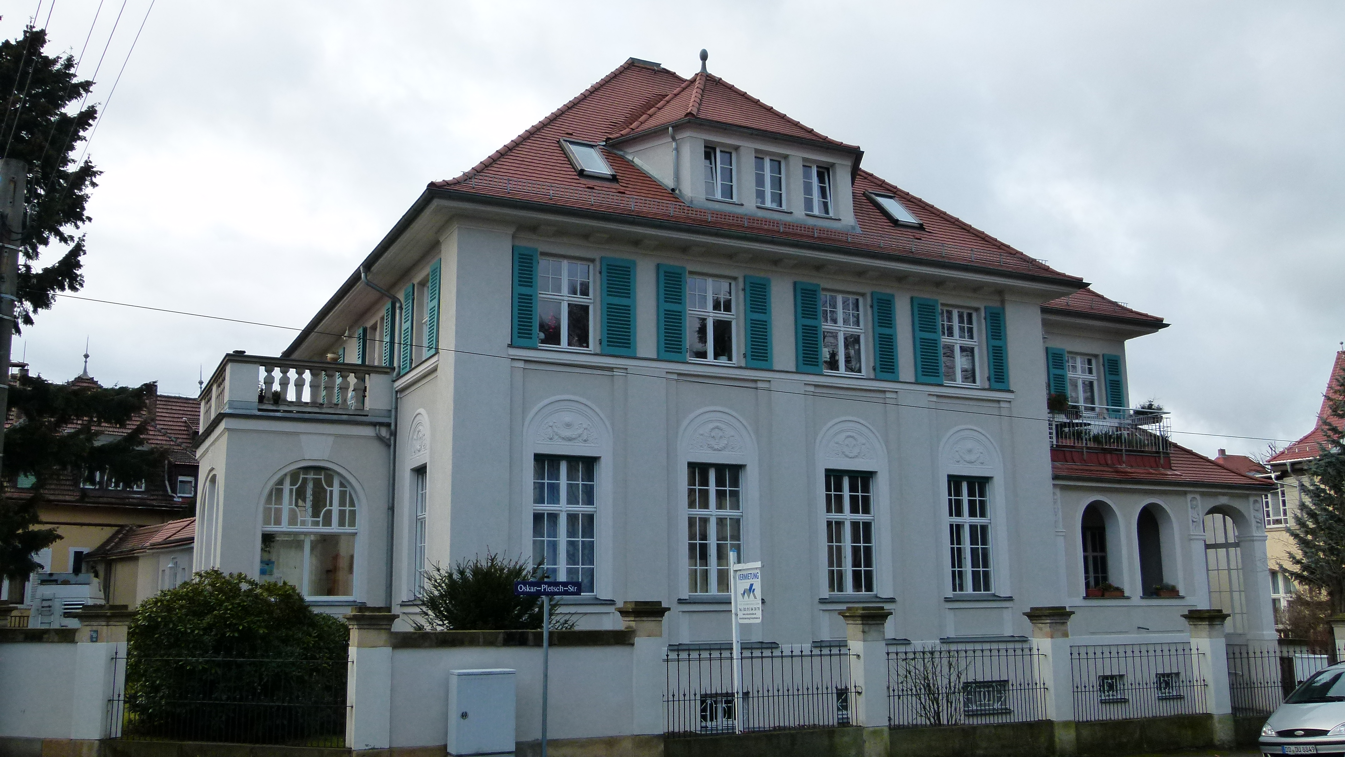 Landhaus Dittrich - denkmalgeschütztes Haus, Oskar-Pletsch-Straße 1, Loschwitz, Dresden (früher Loschwitz, Ferdinandstr. 2). Ehem. Besitz von Carl Dittrich bzw. der Firma "Hielle & Dittrich" in Schönlinde/Böhmen; Sterbeort von Carl Josef Gustav Dittrich am 17. April 1918.